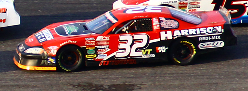 Jean-Paul Cyr au Circuit Riverside Speedway Ste-Croix en 2011. Photo Paul-Émile Poulin-Jacques